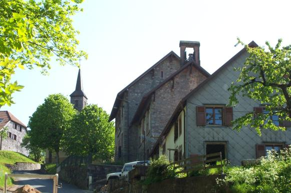 Mairie, Ecole et Eglise de Bellefosse